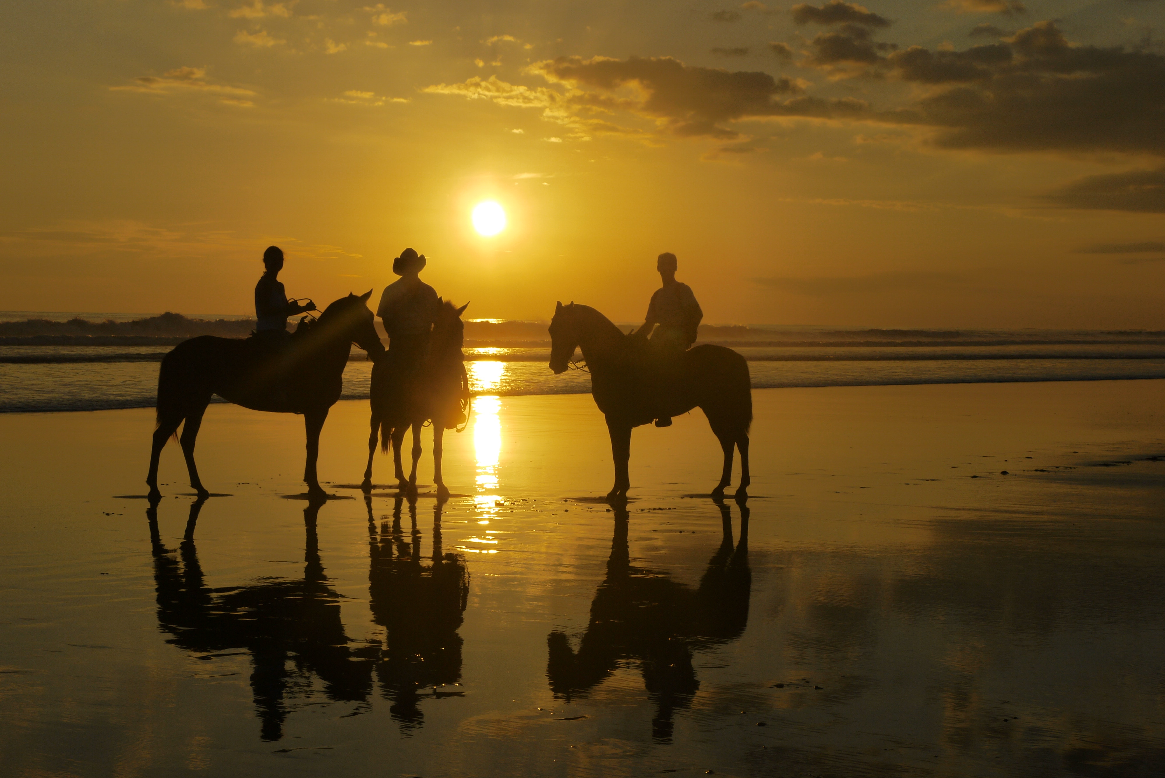 Atardecer en playa Esterillos, Costa Rica.